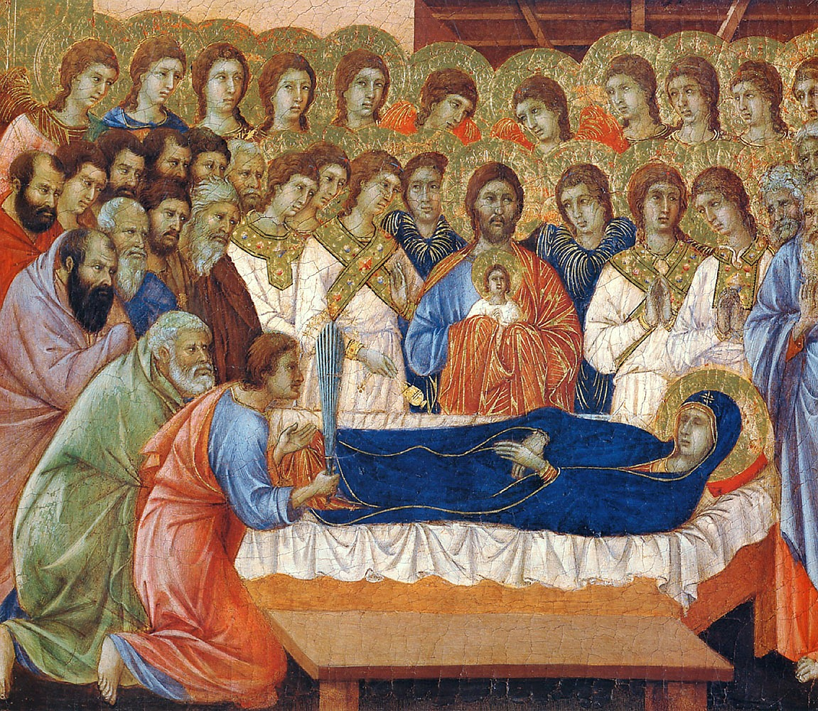 Maesta. detail. Duccio. (True colored)